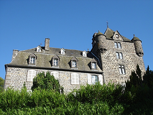 Chateau de Comblat a Vic-sur-Cere